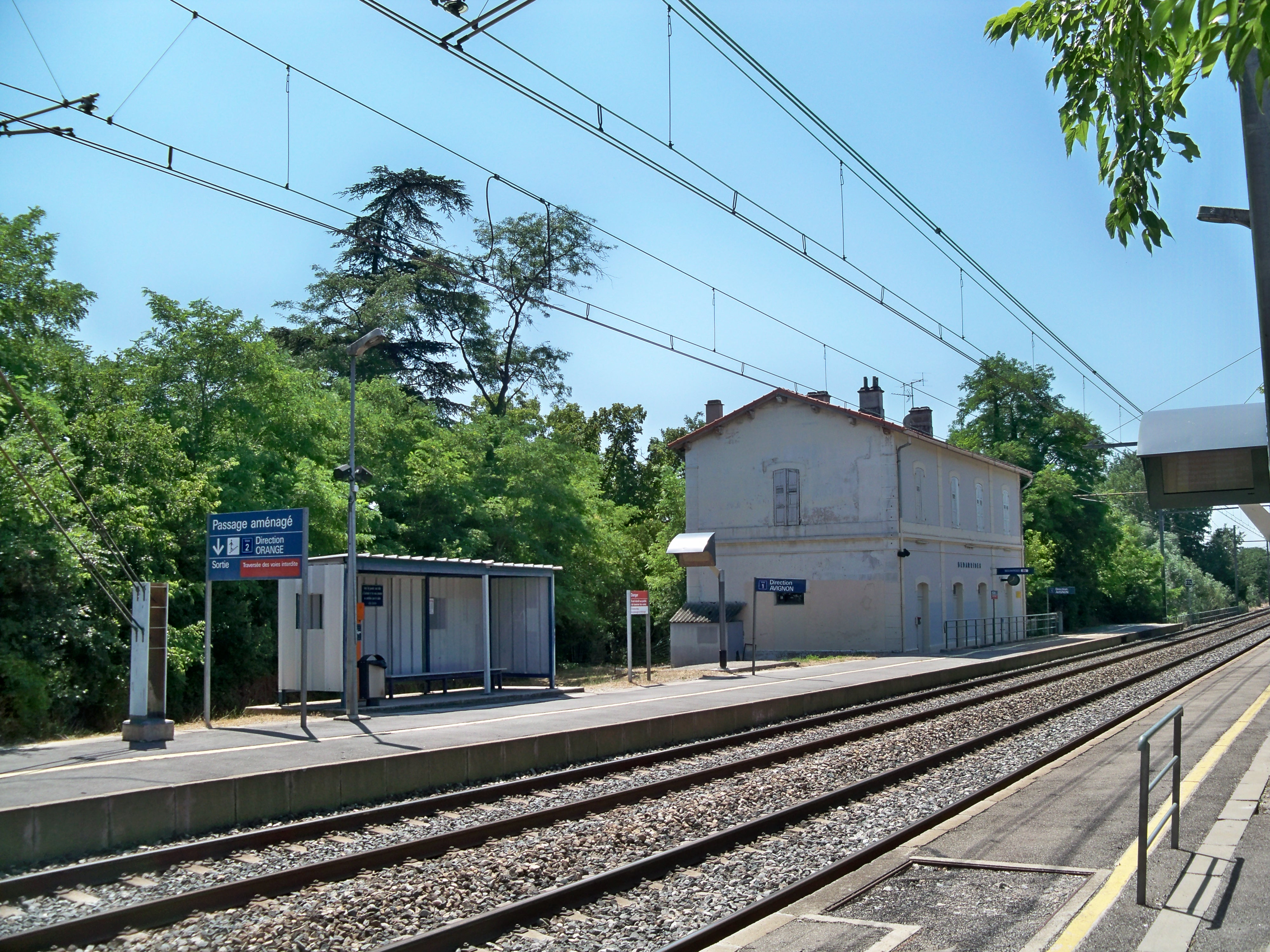 Gare de Bédarrides : Gare coté voies